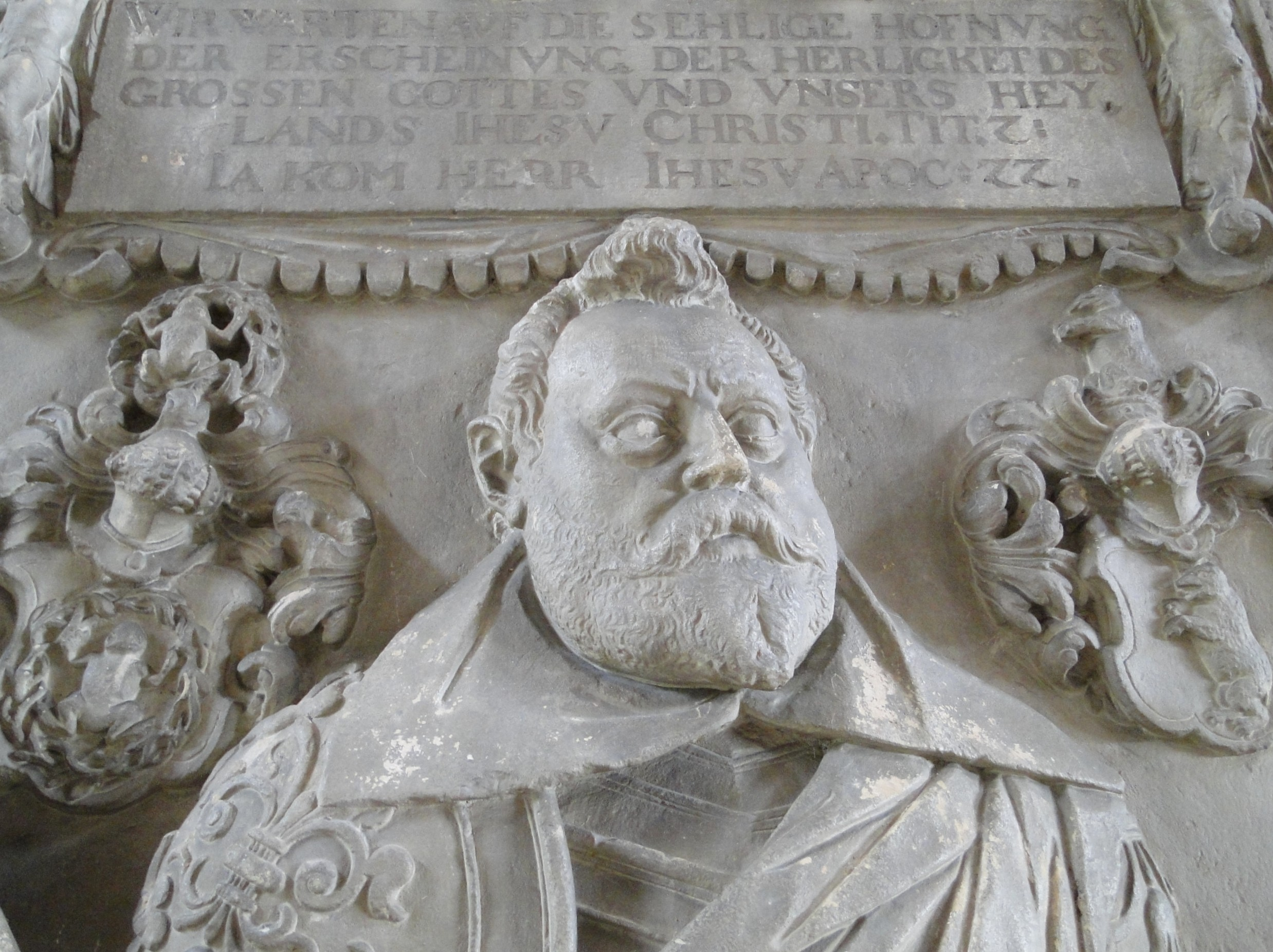 Die Weinbergkirche in Dresden-Pillnitz